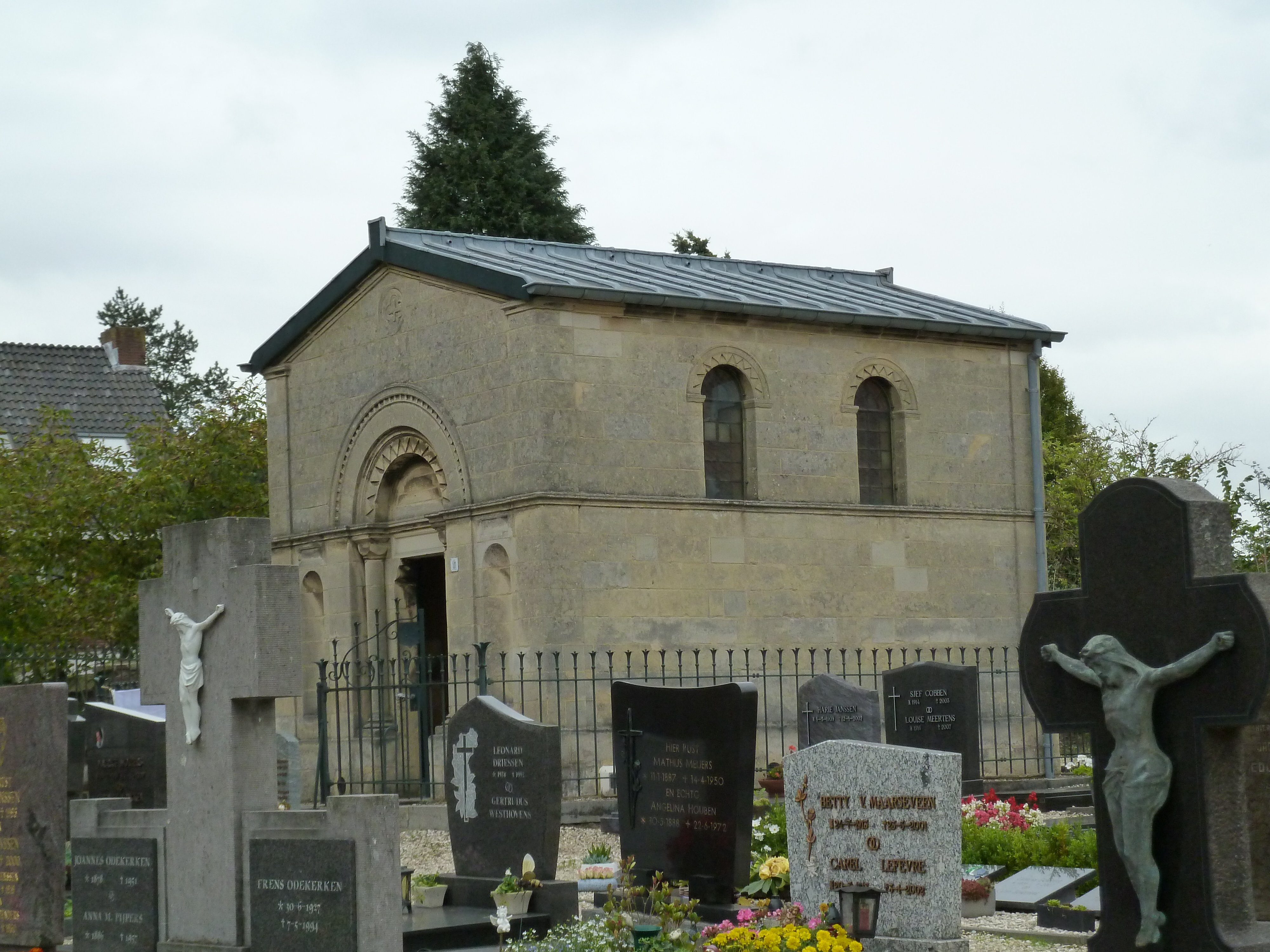 Grafkapel op kerkhof bij kerk Op de Berg, Elsloo, Limburg, Nederland